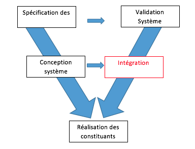 Cycle en V mettant en exergue la place de l'integration